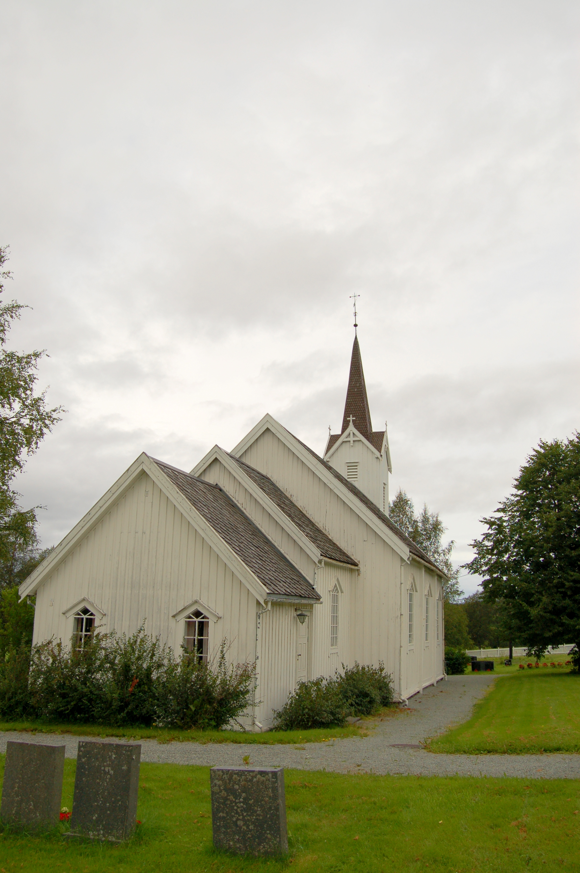 Elvran kapell